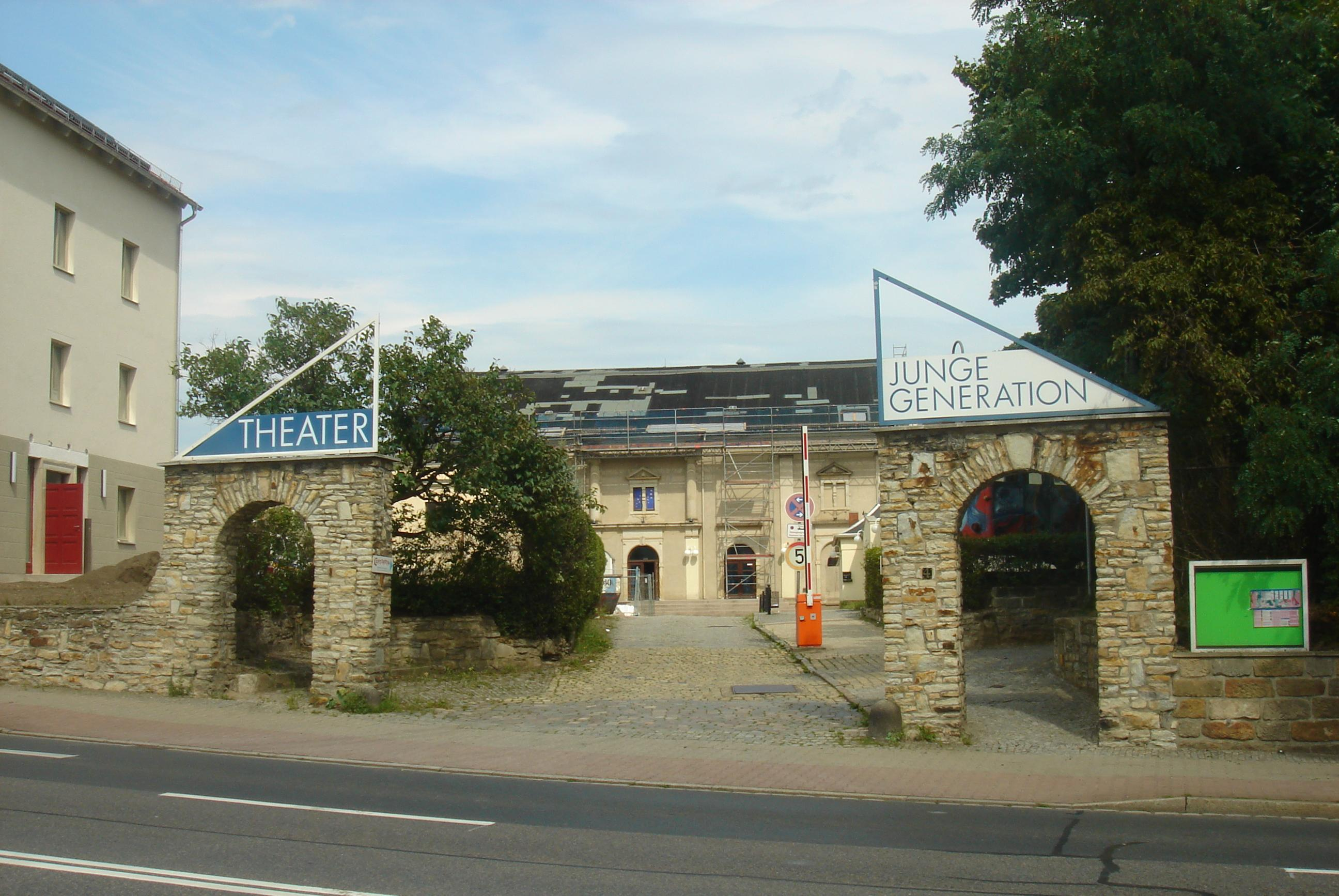 Theater Junge Generation Dresden-Cotta, Blick von der Meißner Landstraße aus